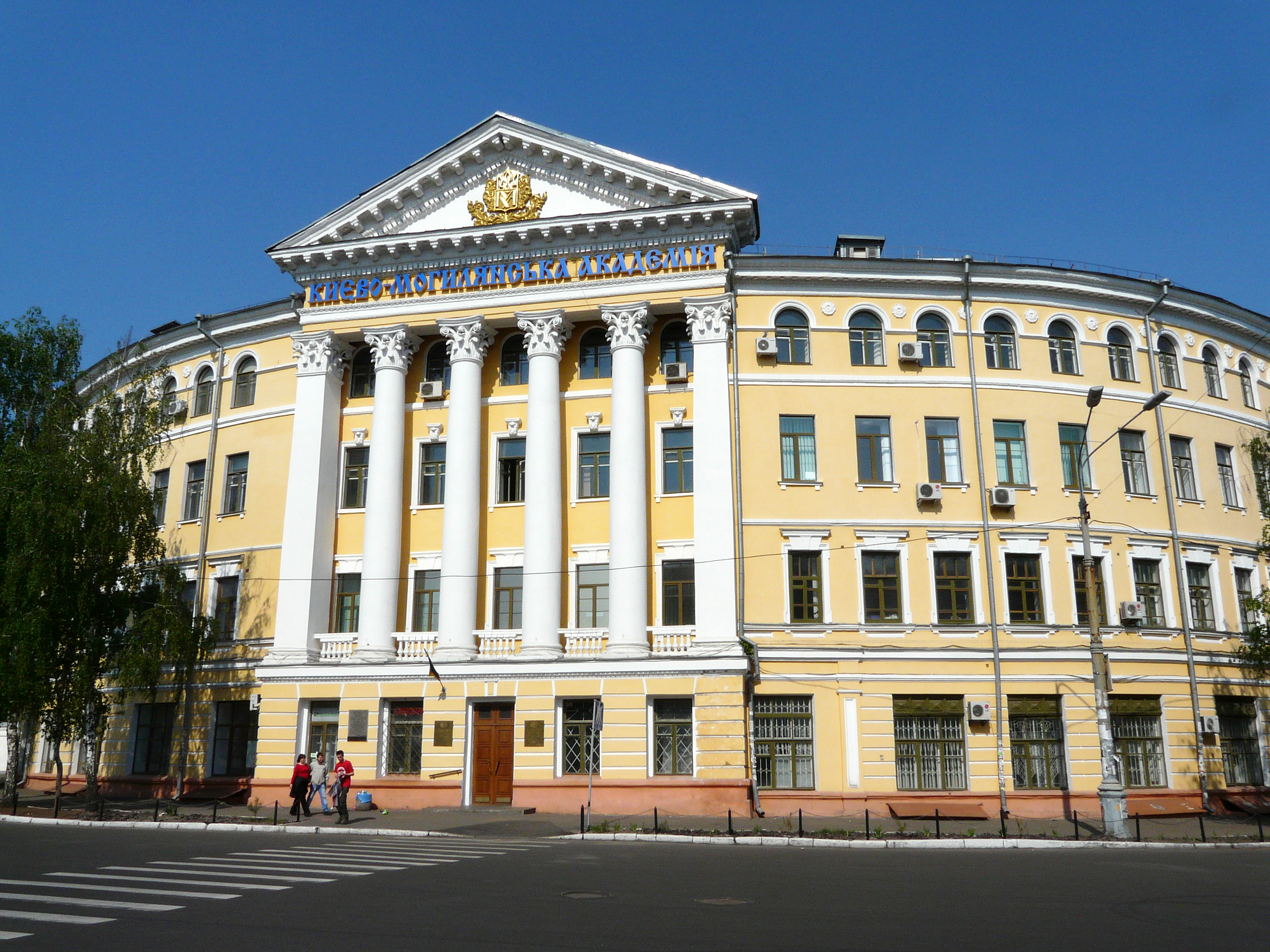 Будинок з крамницями, в якому у 1941 р. містився штаб Дніпровської військової флотилії, Київ, Контрактова пл., 3